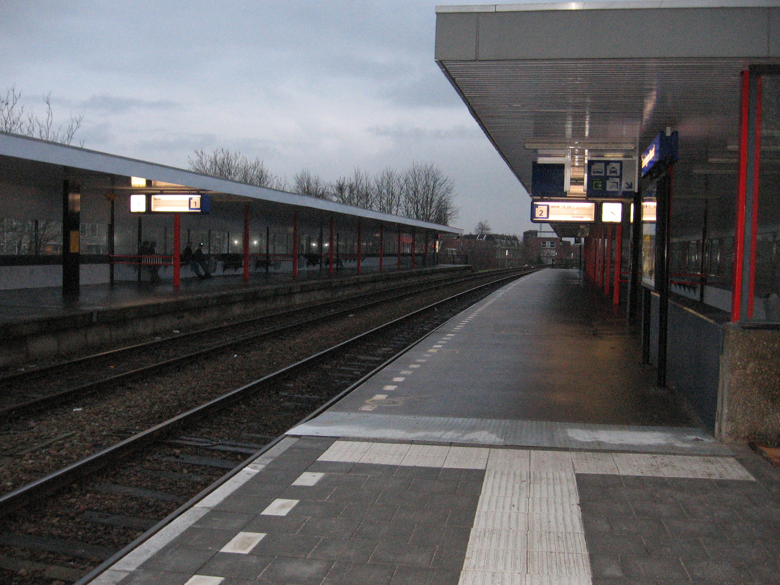 Het perron van Station Groningen Noord